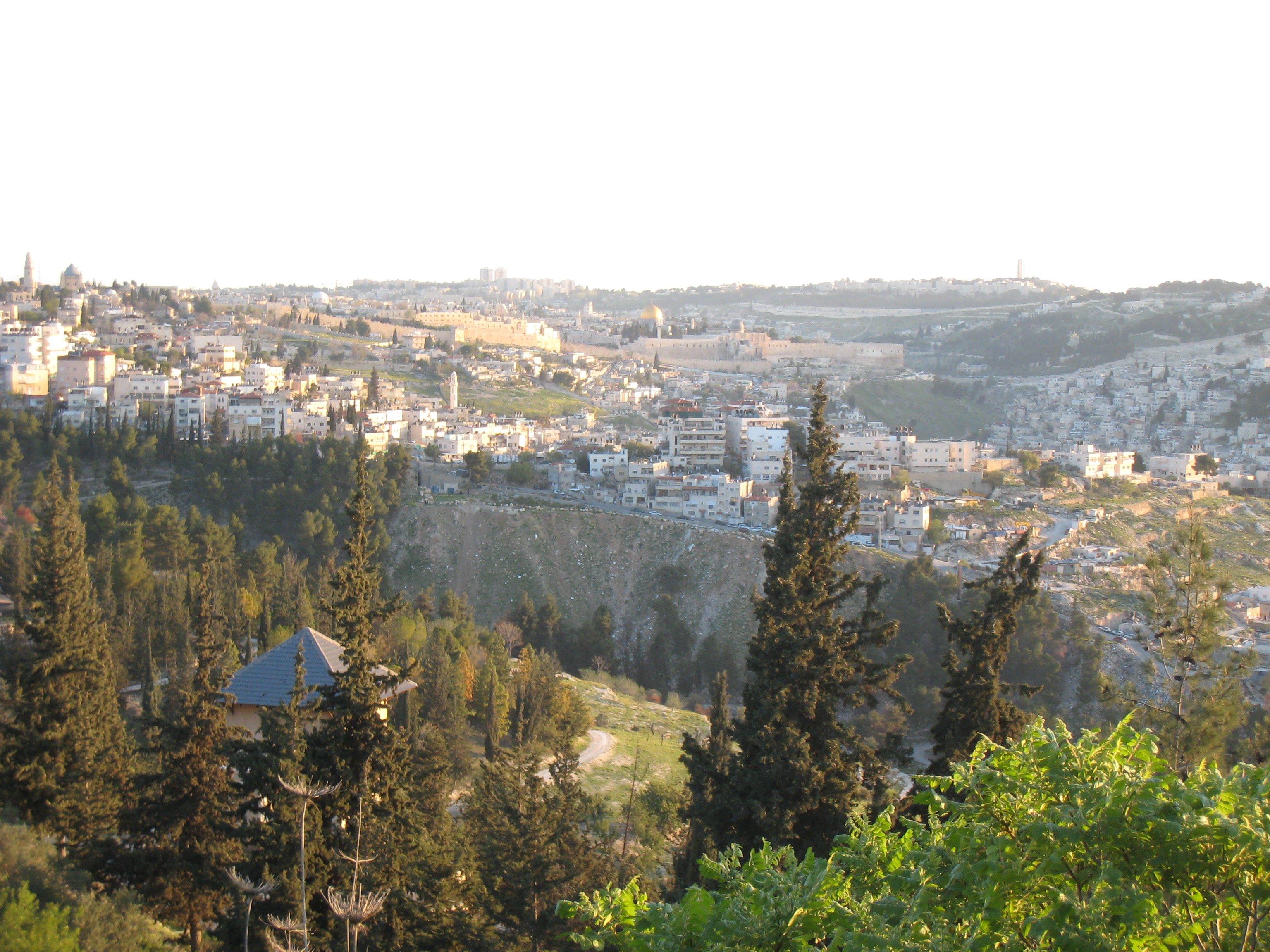 Sunrise over Jerusalem Jerusalem